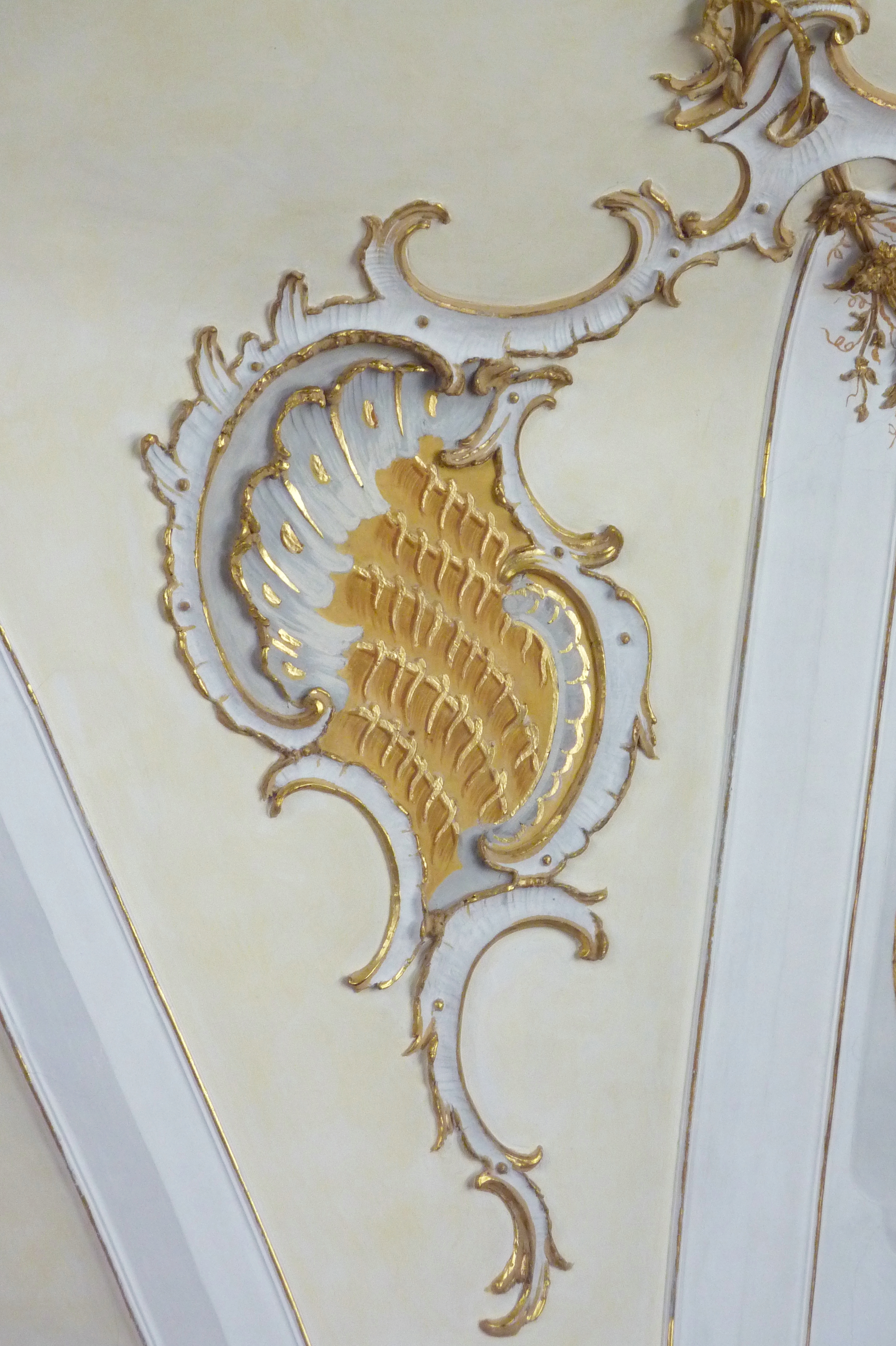 Katholische Pfarrkirche Maria Immaculata in Schwennenbach, einem Stadtteil von Höchstädt an der Donau im Landkreis Dillingen an der Donau (Bayern), Deckenmalerei von Johann Anwander von 1758, Muschelwerkkartusche